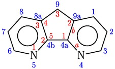 4,5-diazafluorén szerkezeti képlete